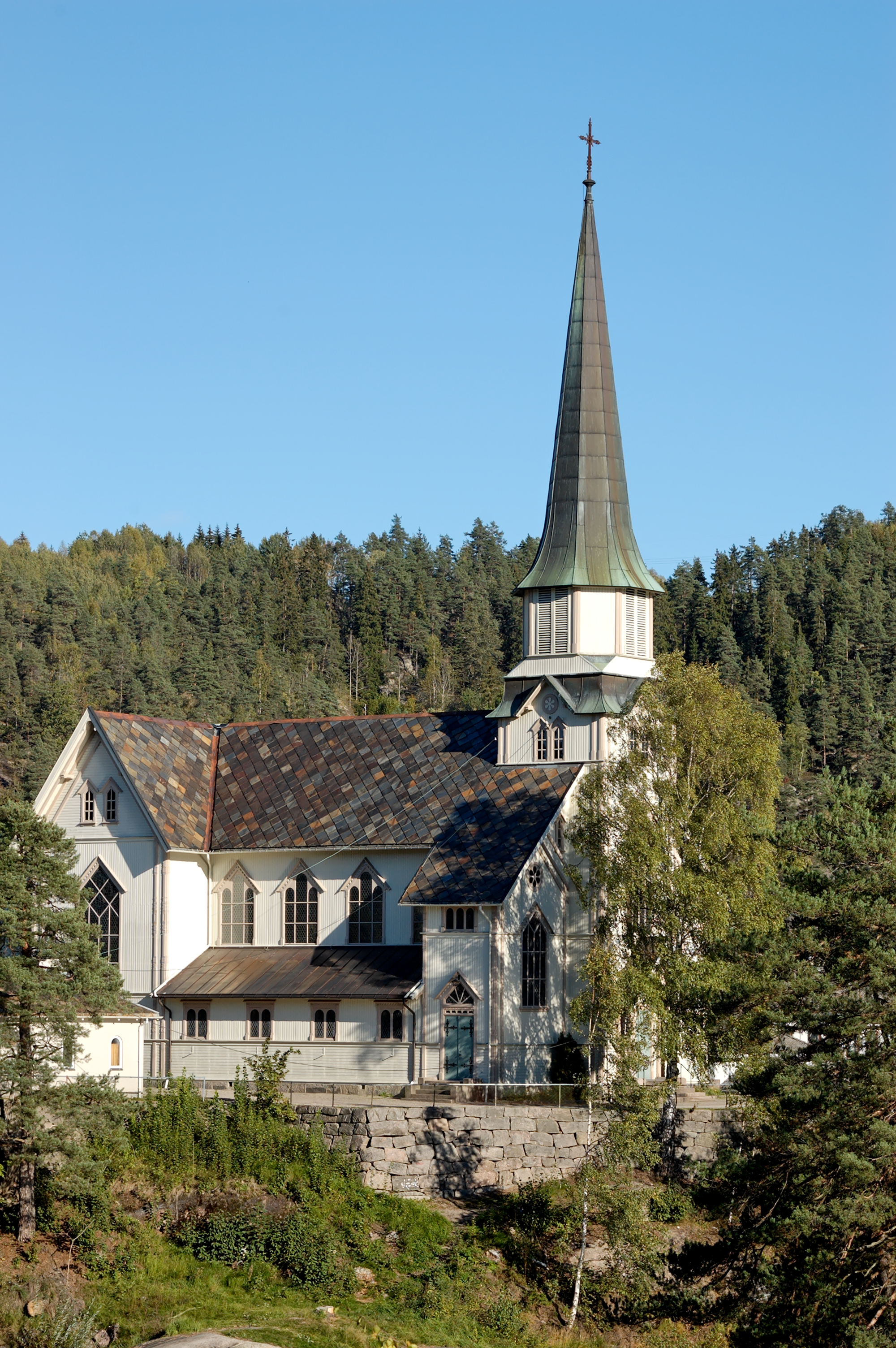 Skotfoss kyrkje i Skien i Telemark en: Skotfoss church in Skien, Telemark, Norway